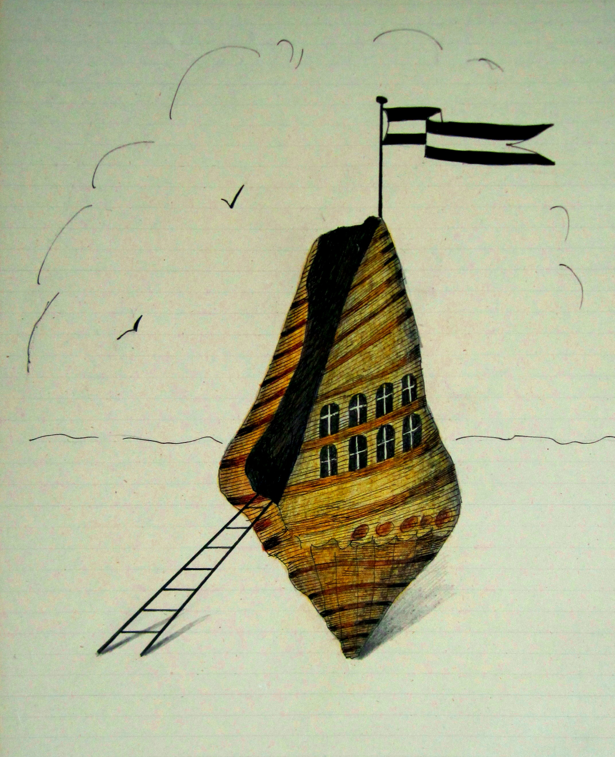 Alternatives Wohnen-2, 2018, Aquarell, Tusche, Farbstift